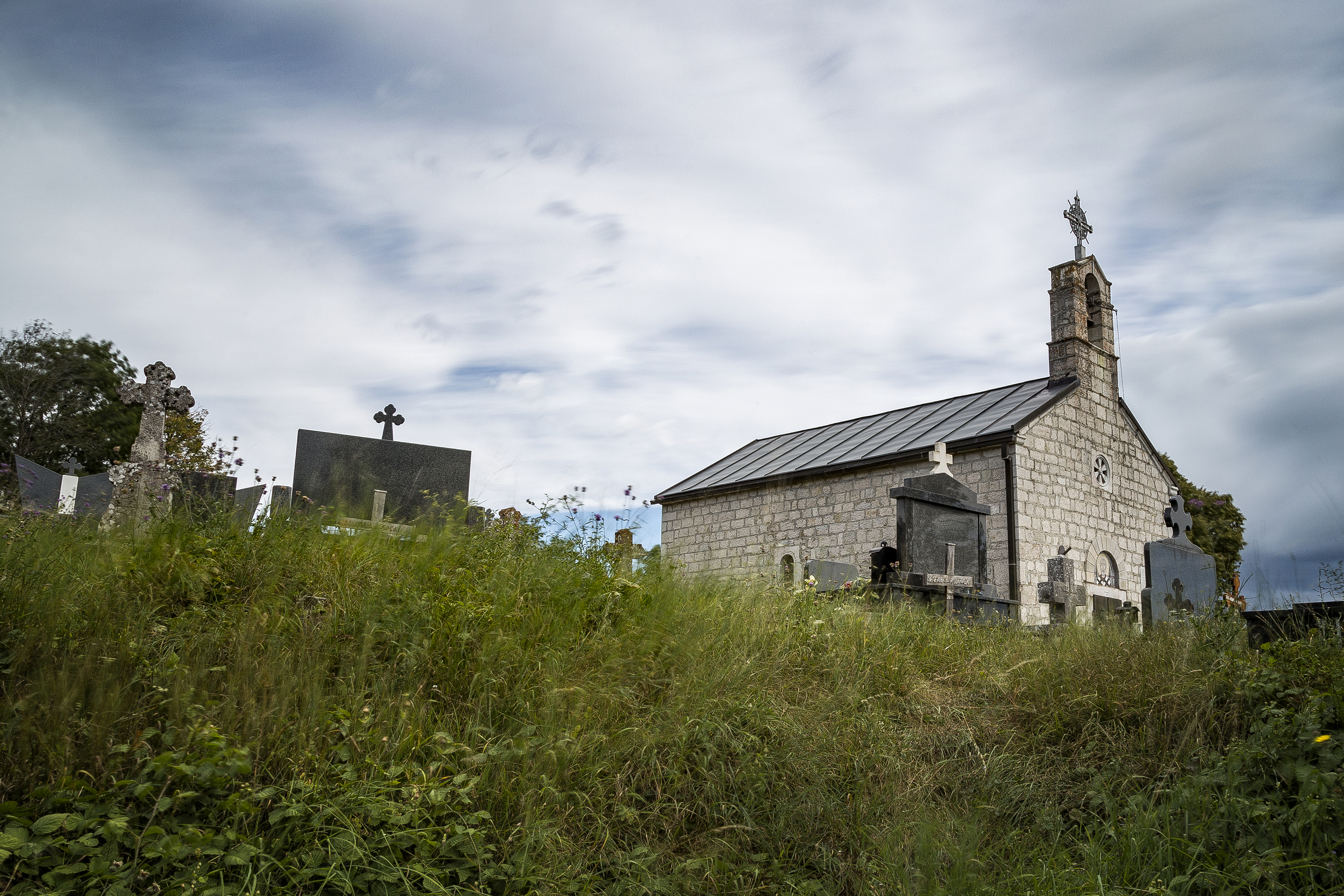 Храм Светог Николаја у селу Михољаче. Обновљен је 1884. што значи да је из ранијег времена. Обновљен је и фрескописан 1999. године.